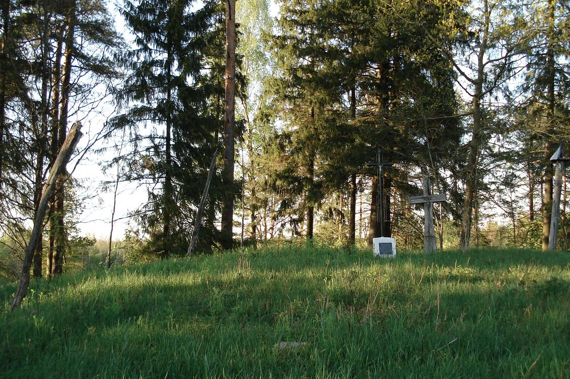 Dalgų senkapiai. Mano daryta nuotrauka